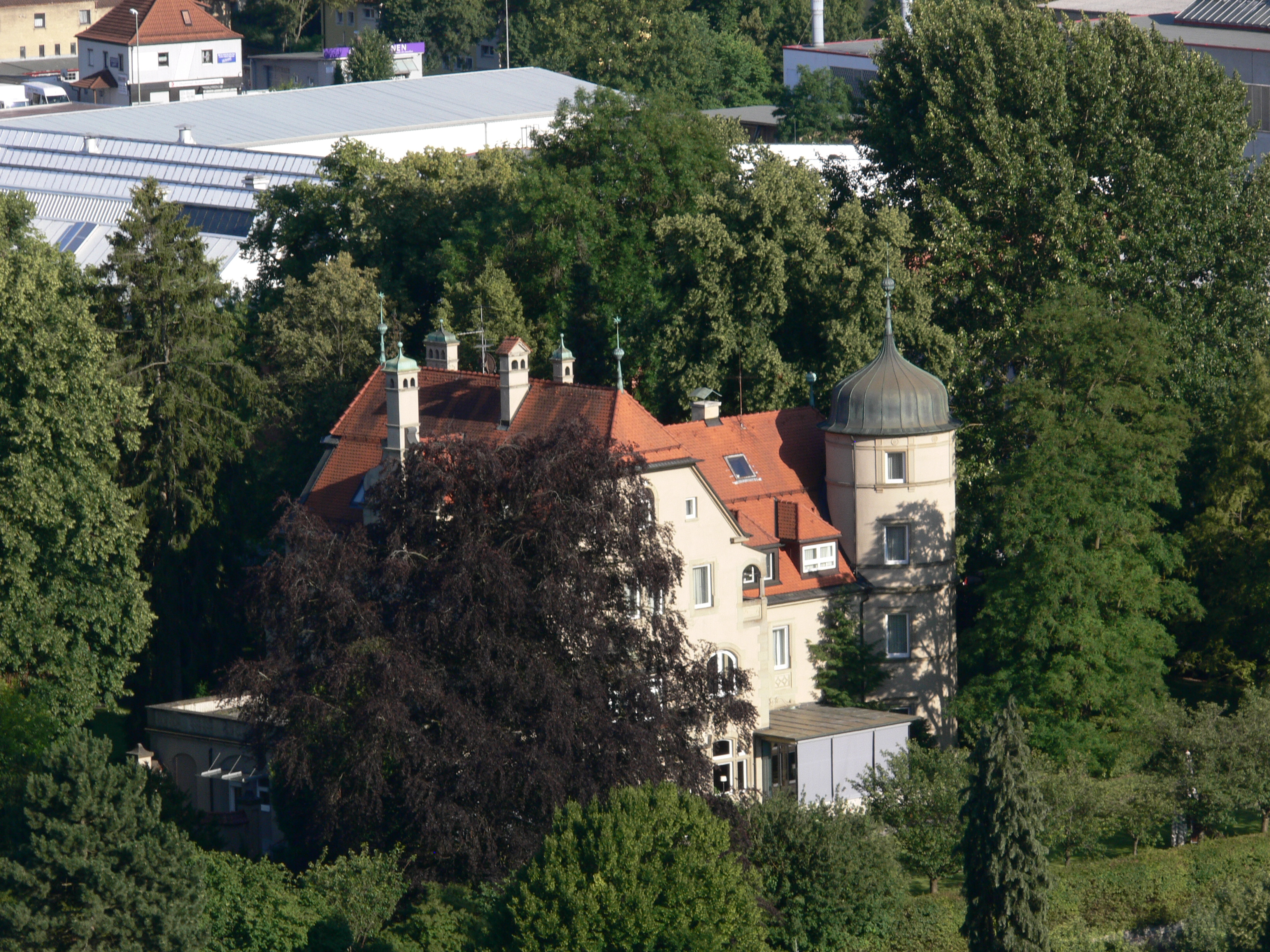 Heidenheim an der Brenz, Blick von Schloss Hellenstein: Gästehaus Eisenhof (für Gäste des Unternehmens Voith)